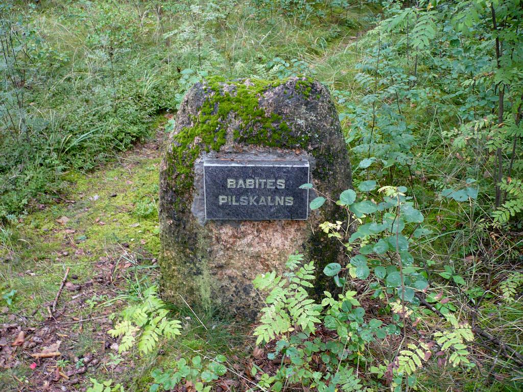 Babītes pilskalna norādes zīme 2008-09-05